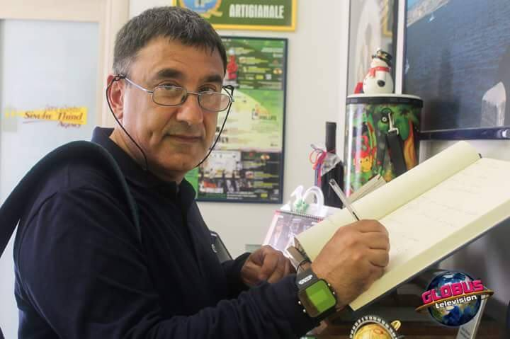 Foto dello scrittore.